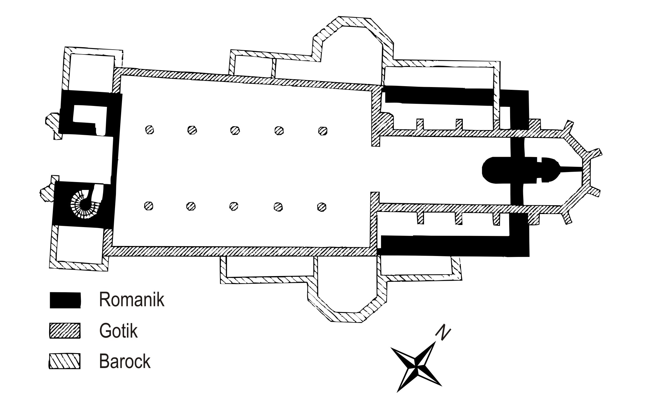 Grundriss des Fridolinsmünster in Bad Säckingen mit Bauphasen